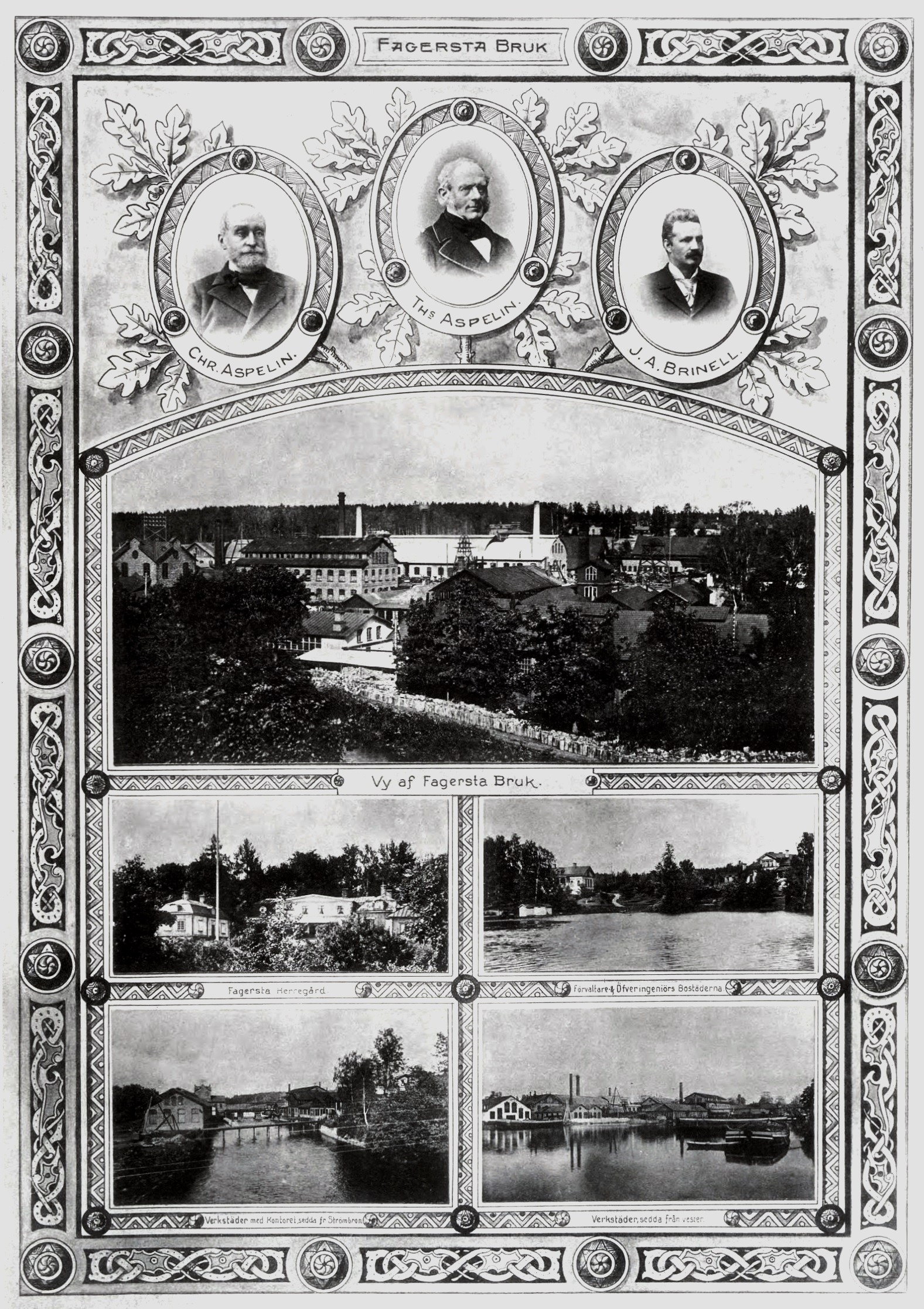 Fagersta bruk